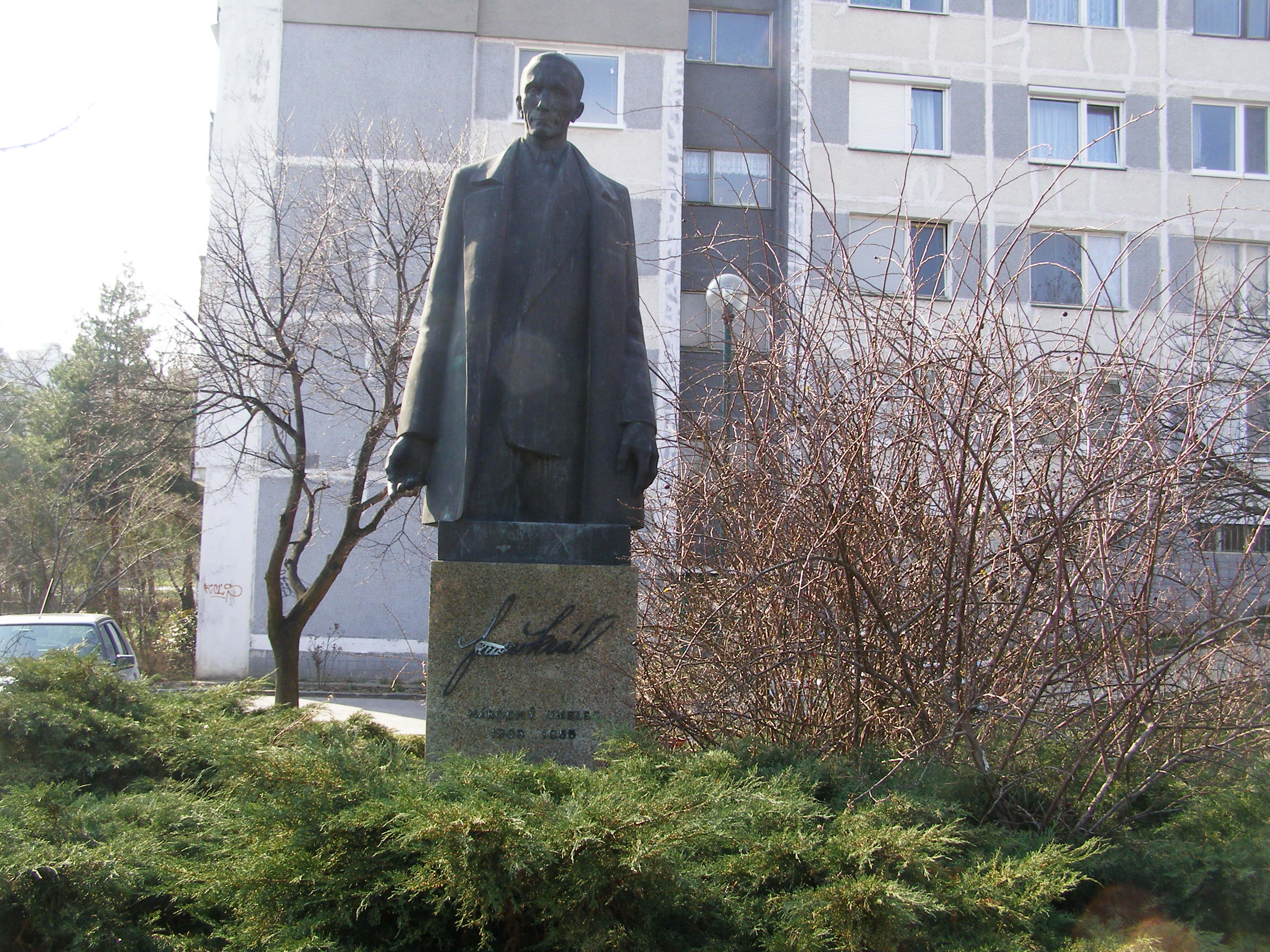 Statue of Fraňo Kráľ, Slovak writer, Tilgnerova street, Karlova Ves, Bratislava, Slovakia